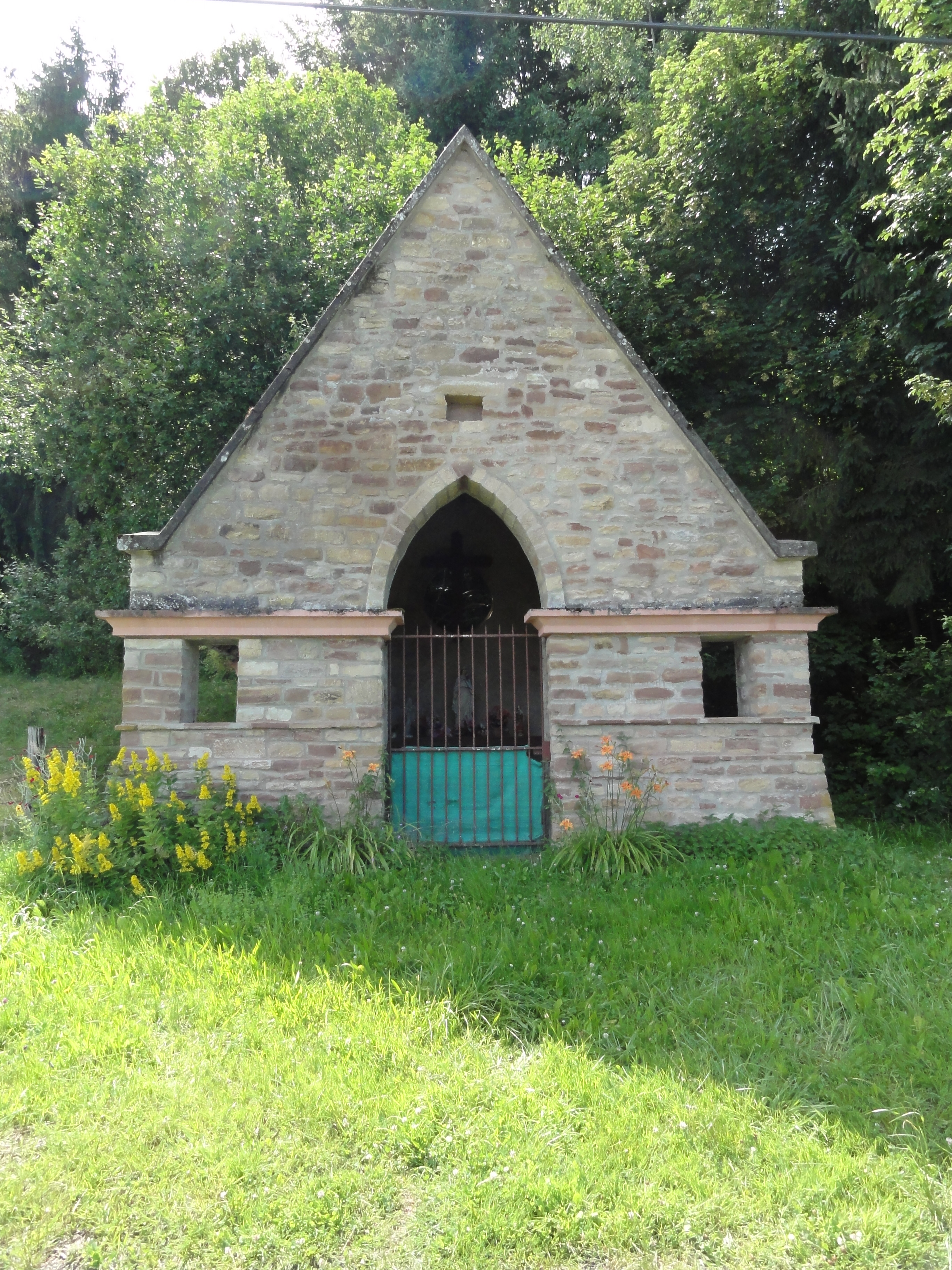 Vacqueville (M-et-M) Chapelle Saint-Étienne